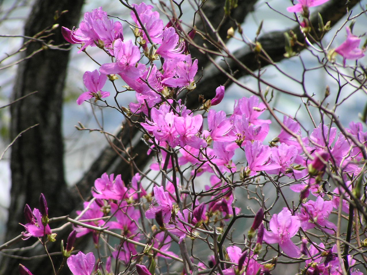 野生のツツジ ～photo by Autumn Snake autumnsnake_japan 【おぉたむすねィく探検隊】